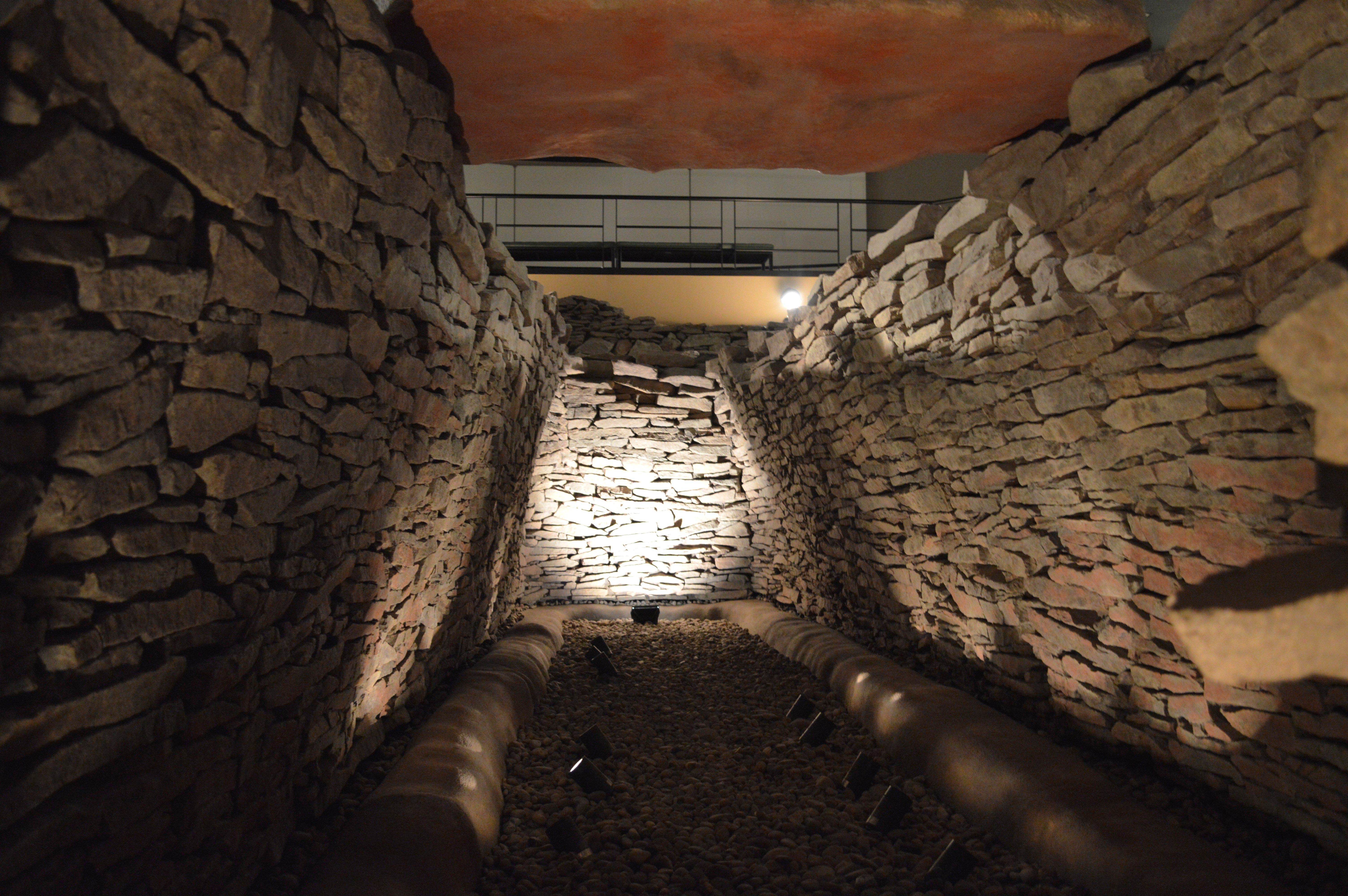 森将軍塚古墳 竪穴式石室 (古墳館内展示の復元, 内部)